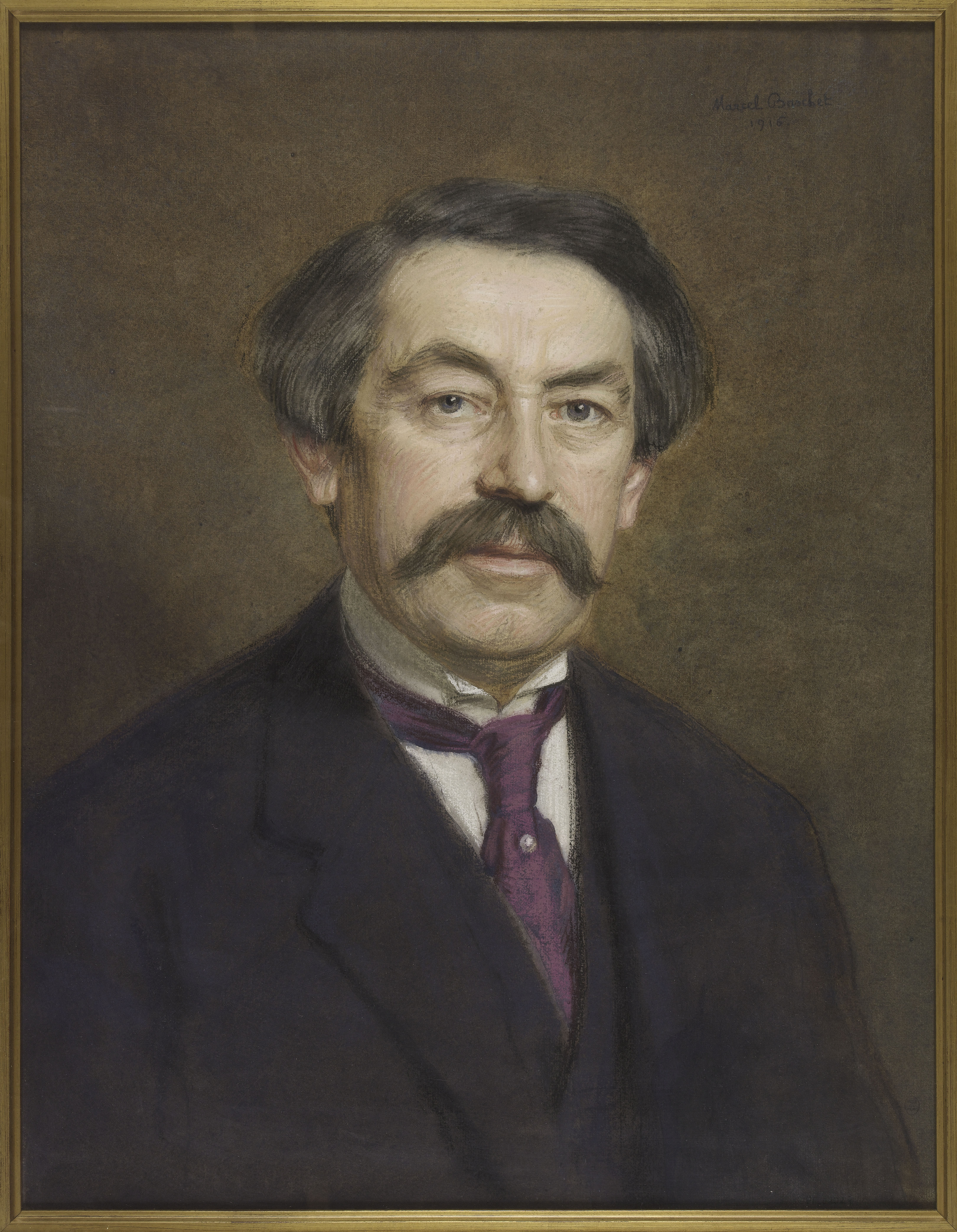 Aristide Briand par Marcel-André Baschet (1916).